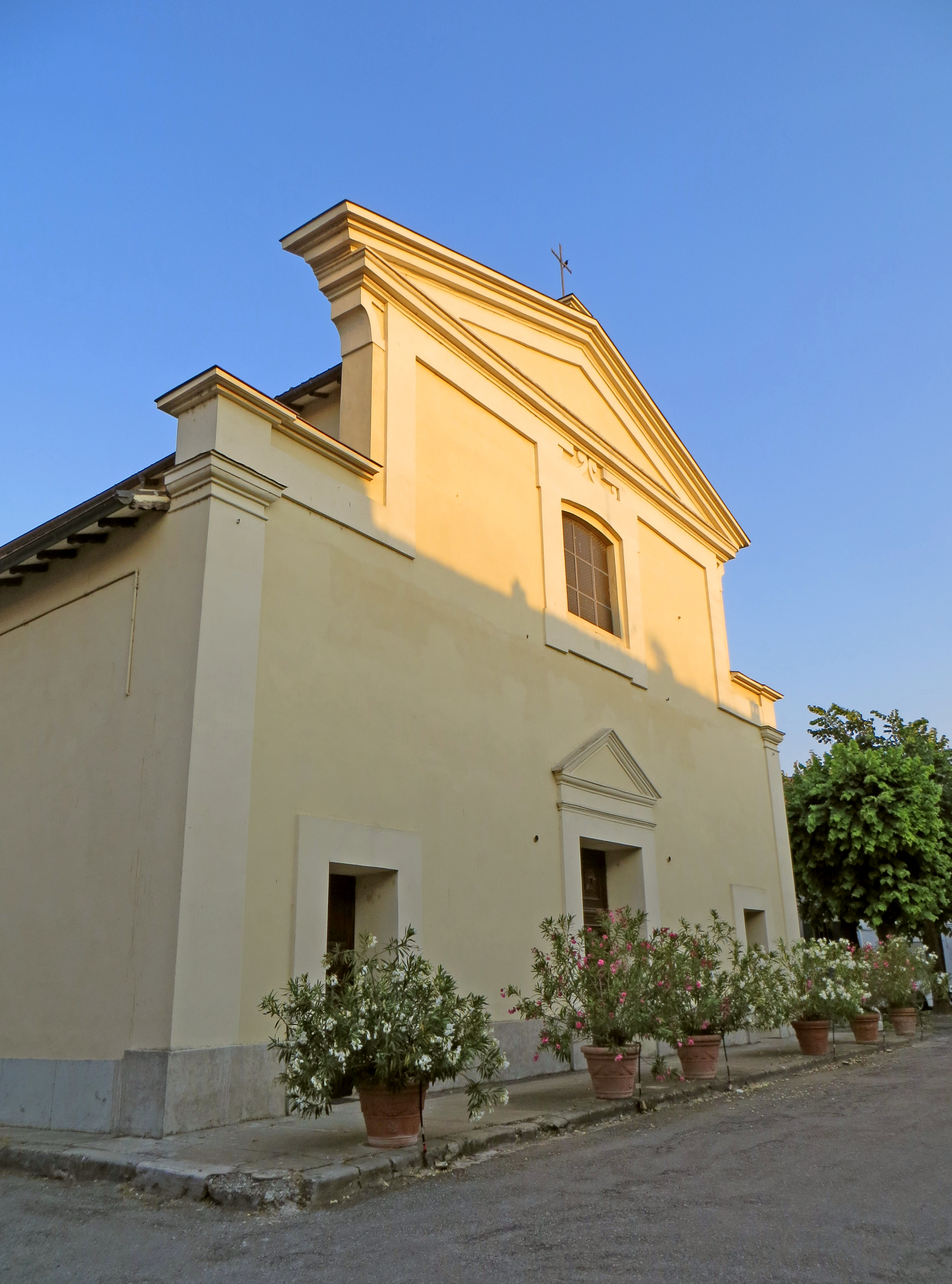 Pieve di San Pancrazio Martire (San Pancrazio Parmense) - facciata